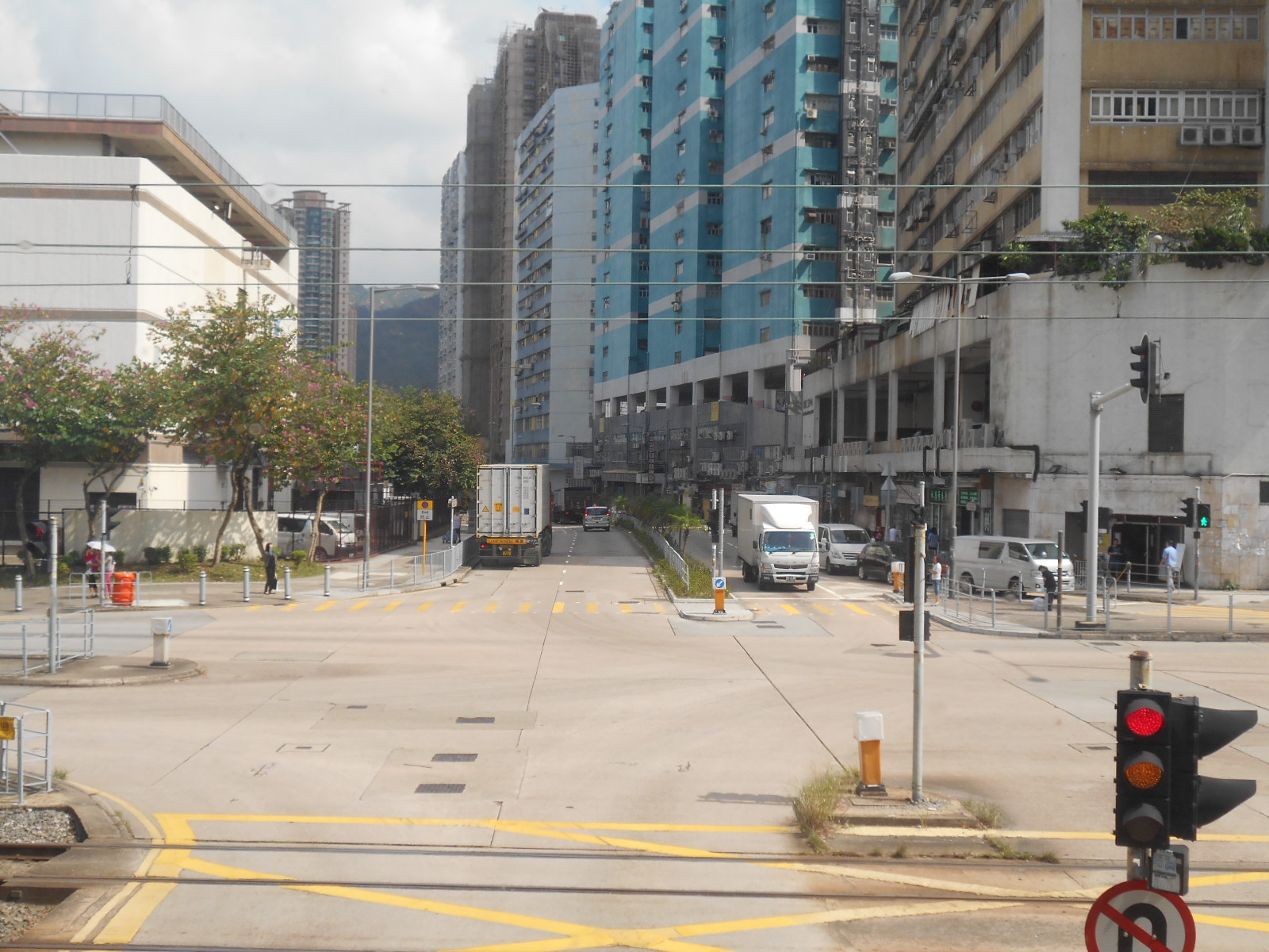 中文（香港）: 石排頭路與輕鐵路軌交匯的十字路口(2016年)